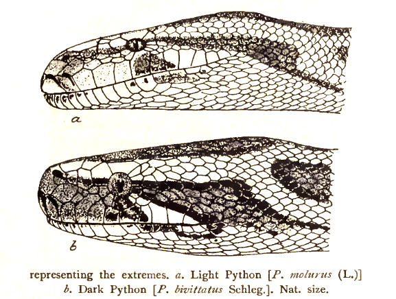 Pythons